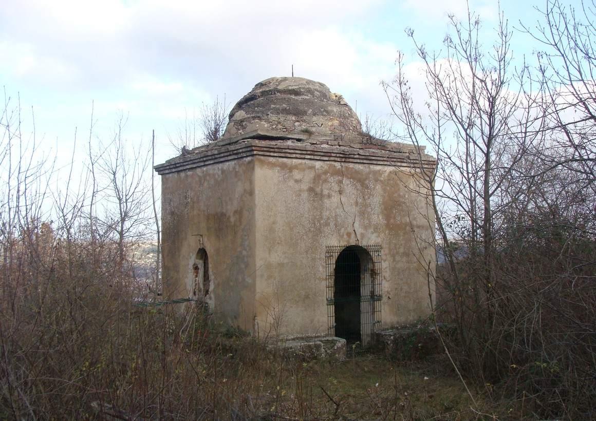 Le Marabout du parc du château de Curis, à l'abandon.